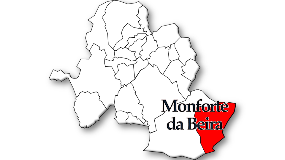 População